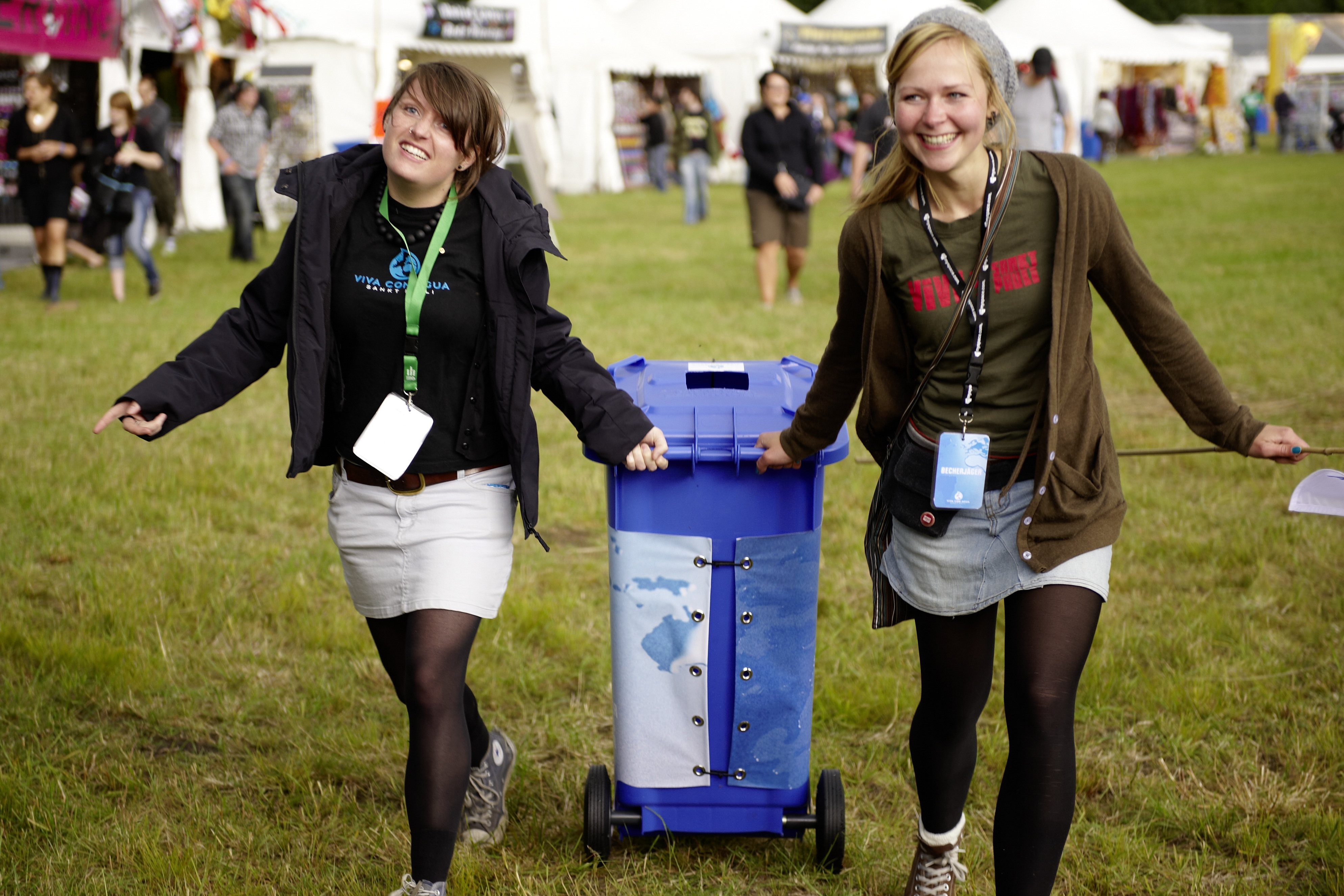 Becher sammeln auf Festivals für die NGO Viva con Agua